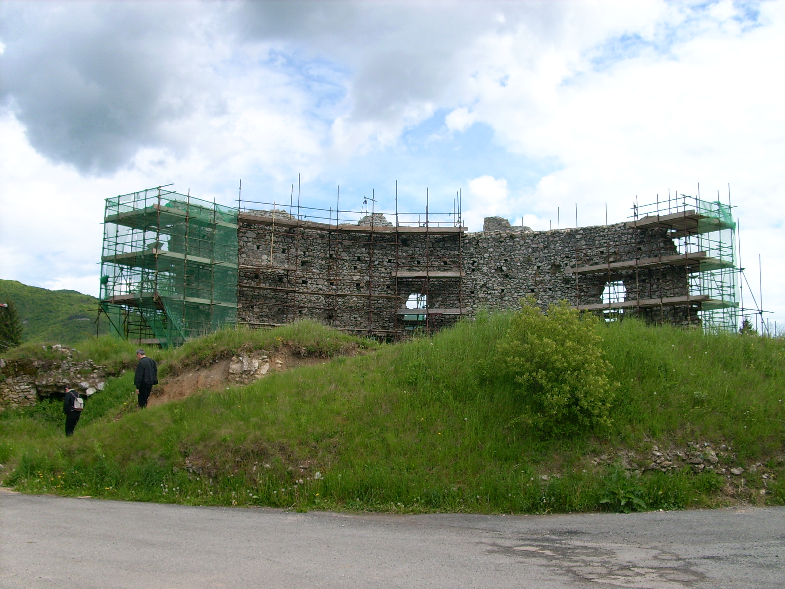 Ruderi del castello di Bardineto, Liguria, Italia